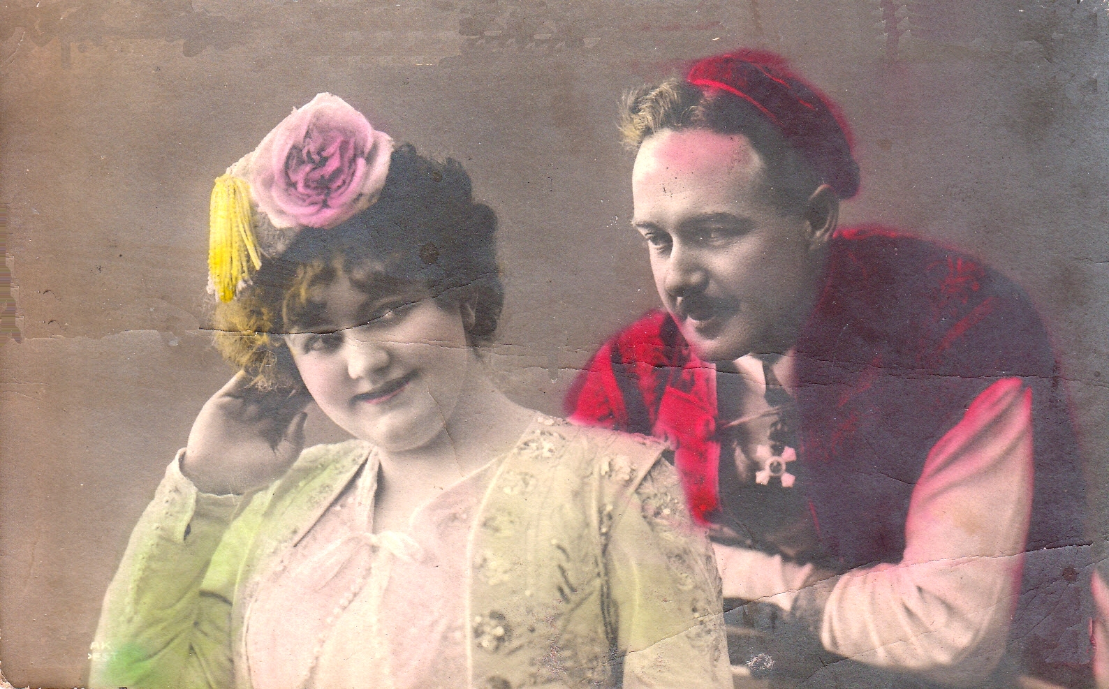 Szoyer Ilonka és Ráthonyi Ákos mint Glavádi Hanna és Danilo, Lehár Ferenc: A víg özvegy című operettjében. Postcard.